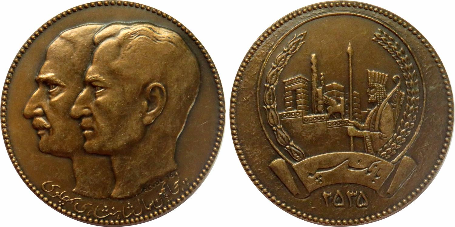 مدال برنز بانک سپه که بمناسبت پنجاهمین سال تأسیس حکومت پهلوی ضرب شد. نشان این بانک در زمان حکومت پهلوی در پشت مدال دیده میشود.